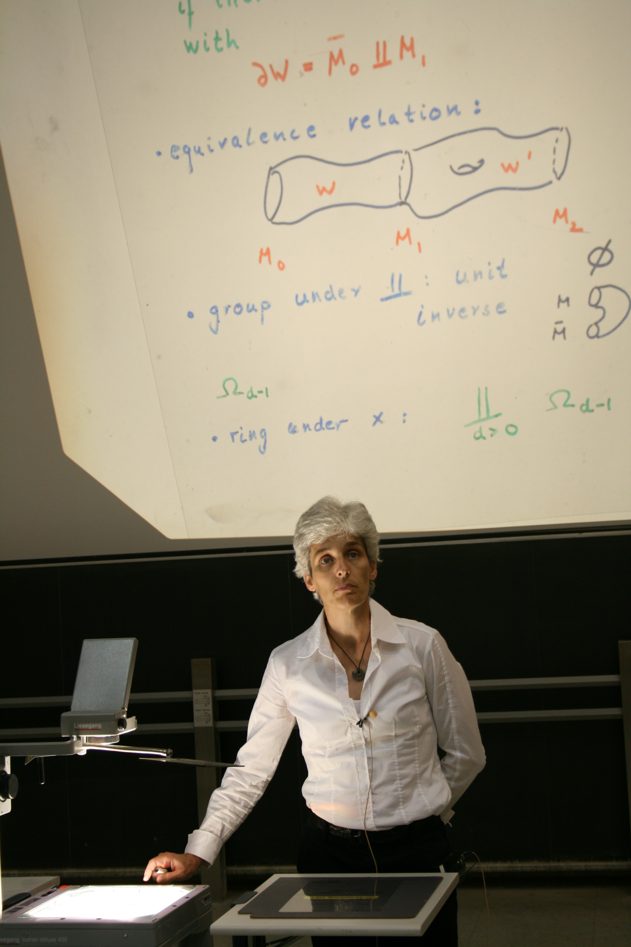 DMV-Jahrestagung 2009 zusammen mit der ÖMG an der TU Graz; die Emmy-Noether-Vorlesung hiet Prof. Dr. Ulrike Tillmann von der University of Oxford.